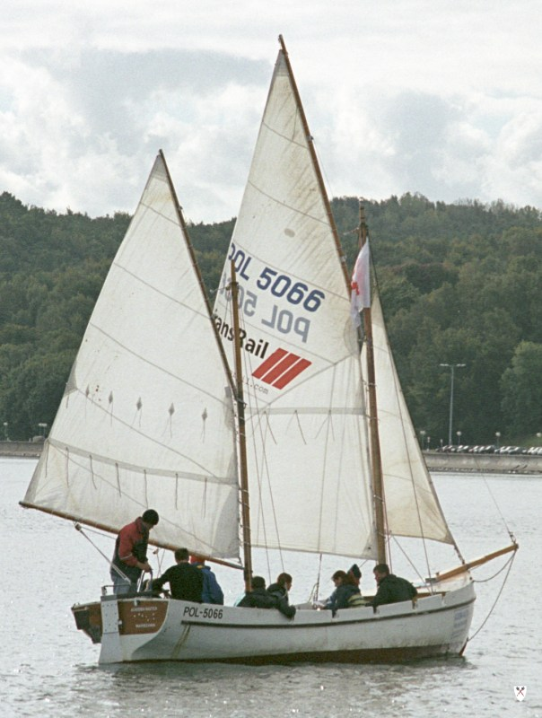 Ketch type DZ